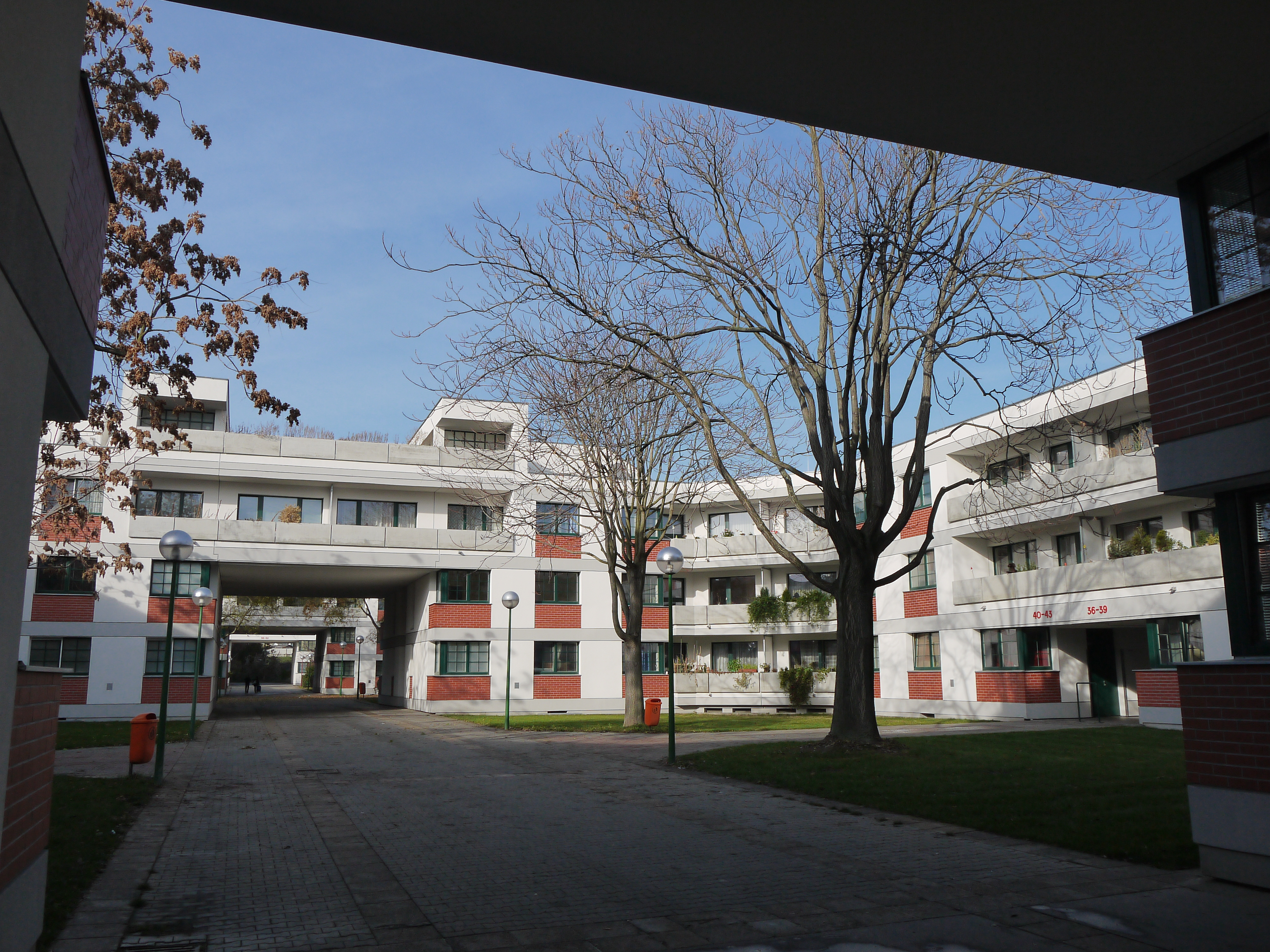 Am Schöpfwerk